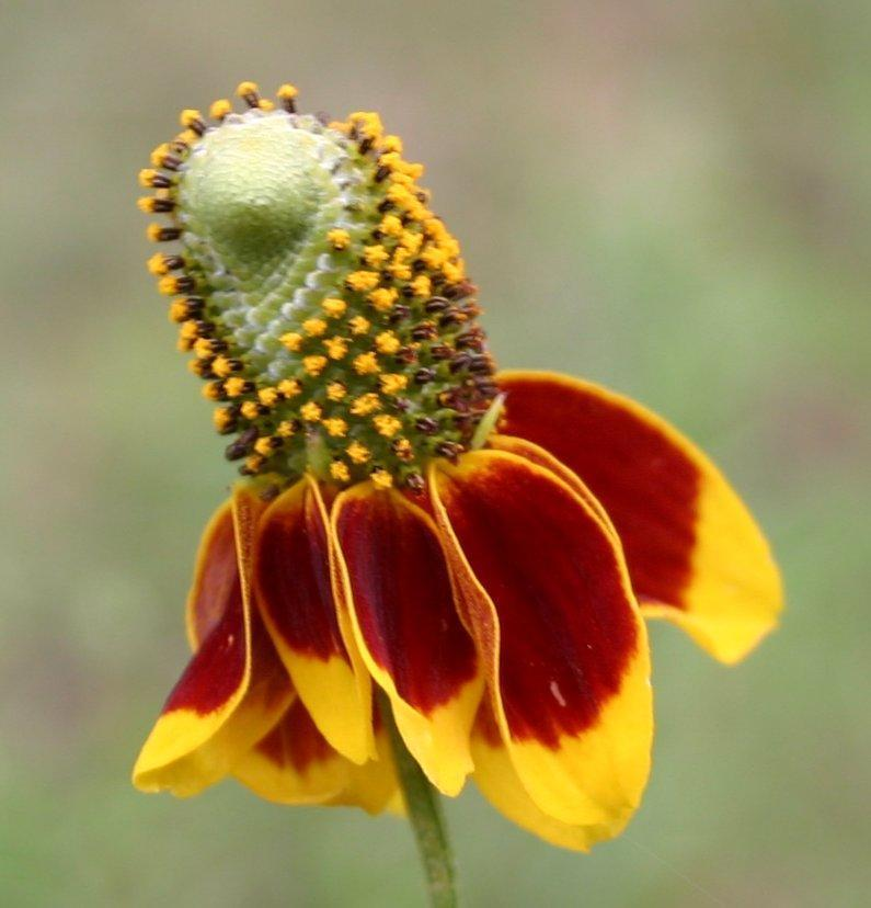 Mexican Hats (Ratibida columnifera)